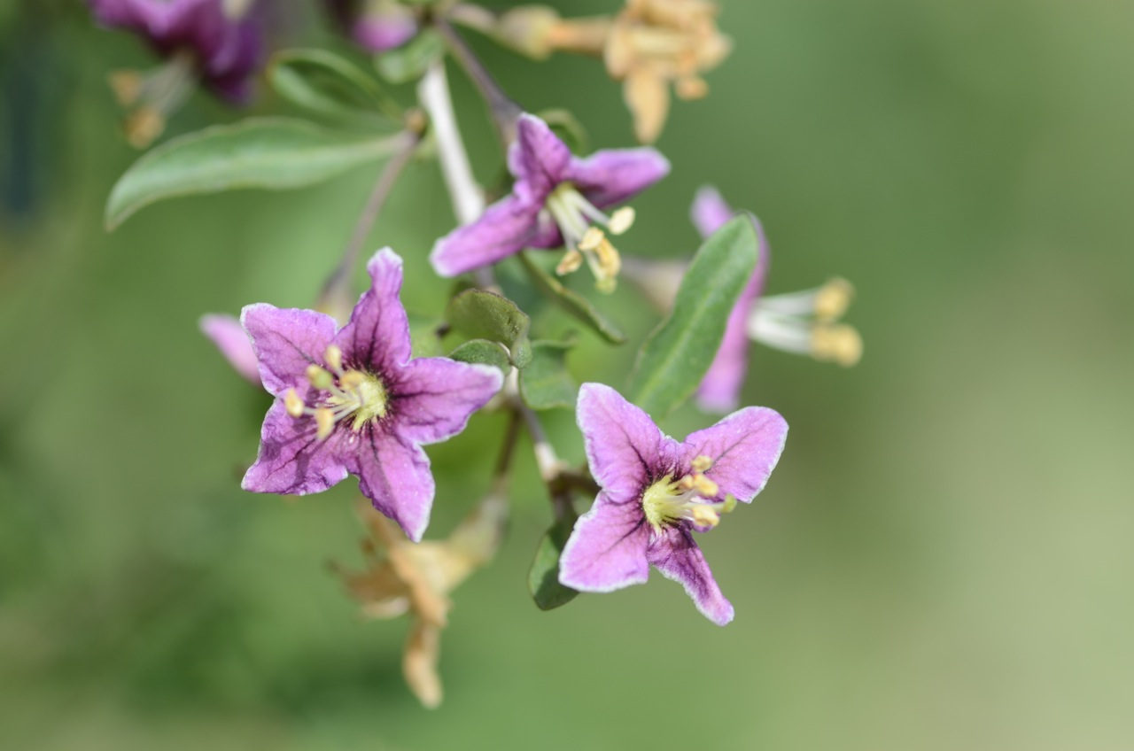 Lycium barbarum